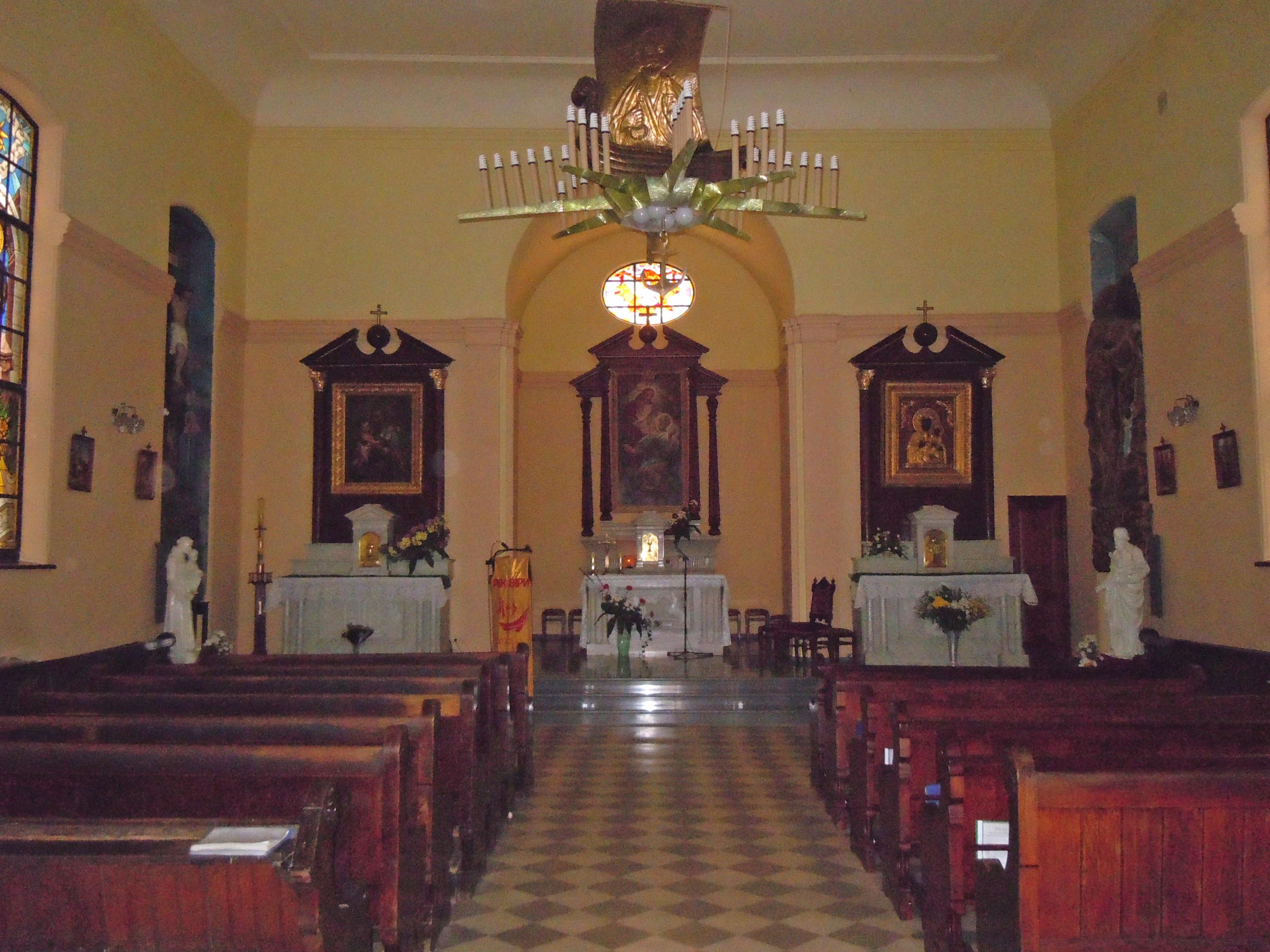 Костьол св. Петра, Одеса, Гаванна вул., 5